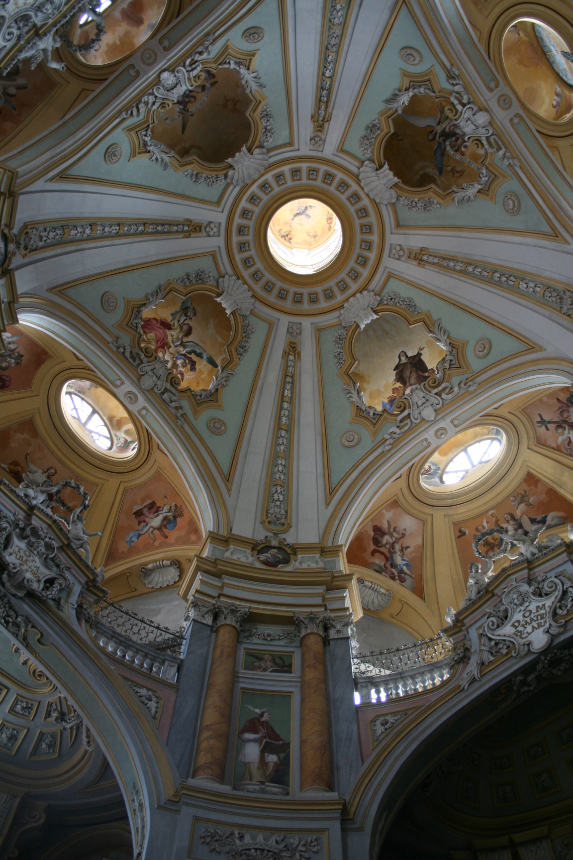 Chiesa di Santa Chiara, Brà